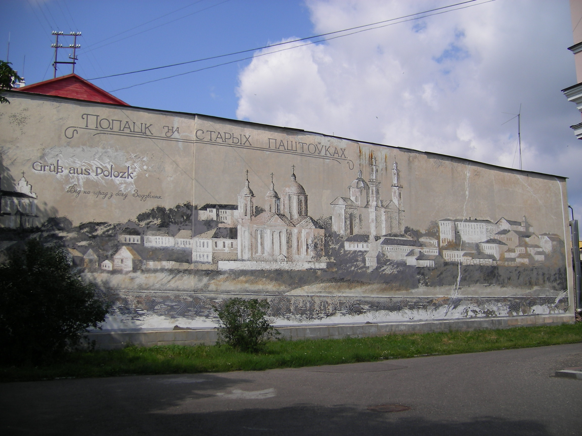 Polatsk in old postcard